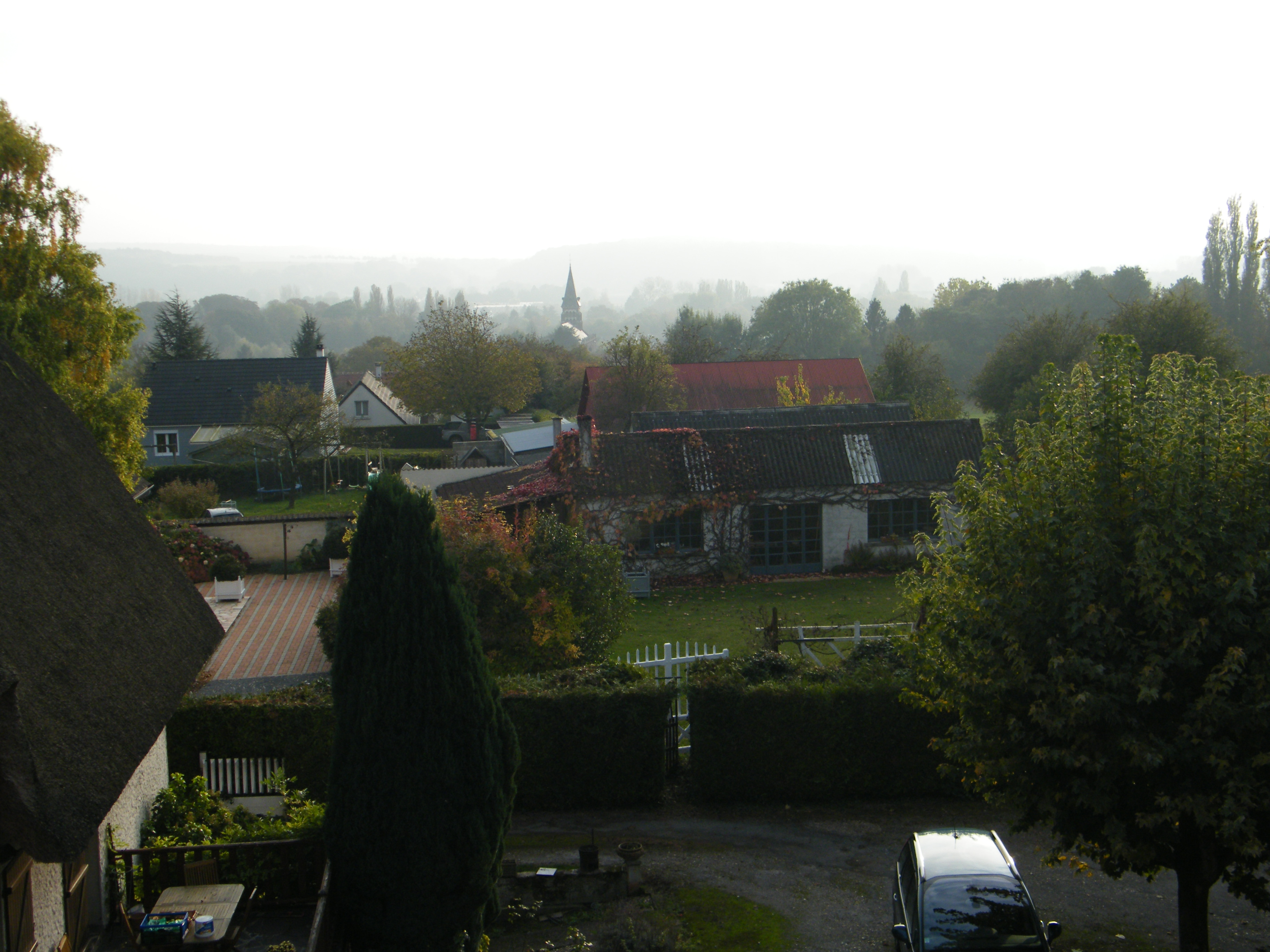 Pont-Rémy, Somme, Fr, vue du bourg dans la vallée de la Somme.